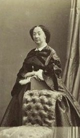 Наталья Львовна Обрескова, ур. Соллогуб (1809— ?), жена дипломата А. М. Обрескова (1790-1885).